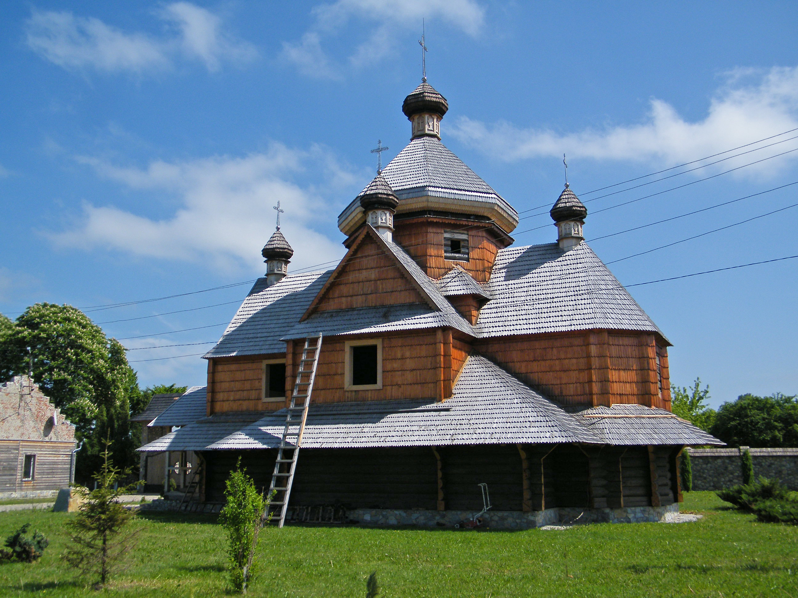 Церковь в "Гуцульской деревне"